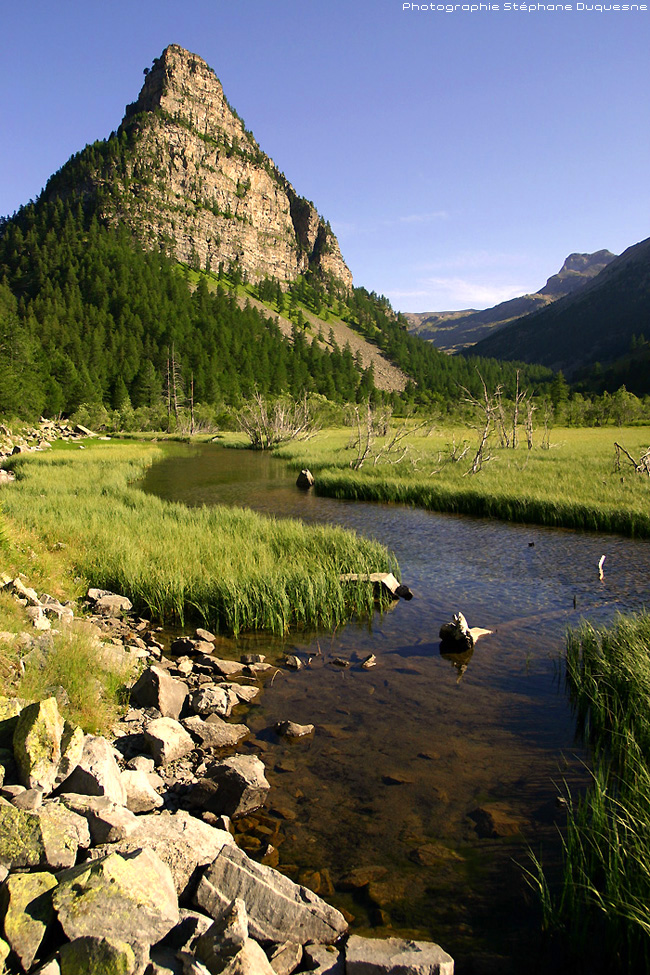 La Tour des Sagnes à Jausiers dans la Vallée de l'Ubaye - Alpes de Haute Provence (04) - France